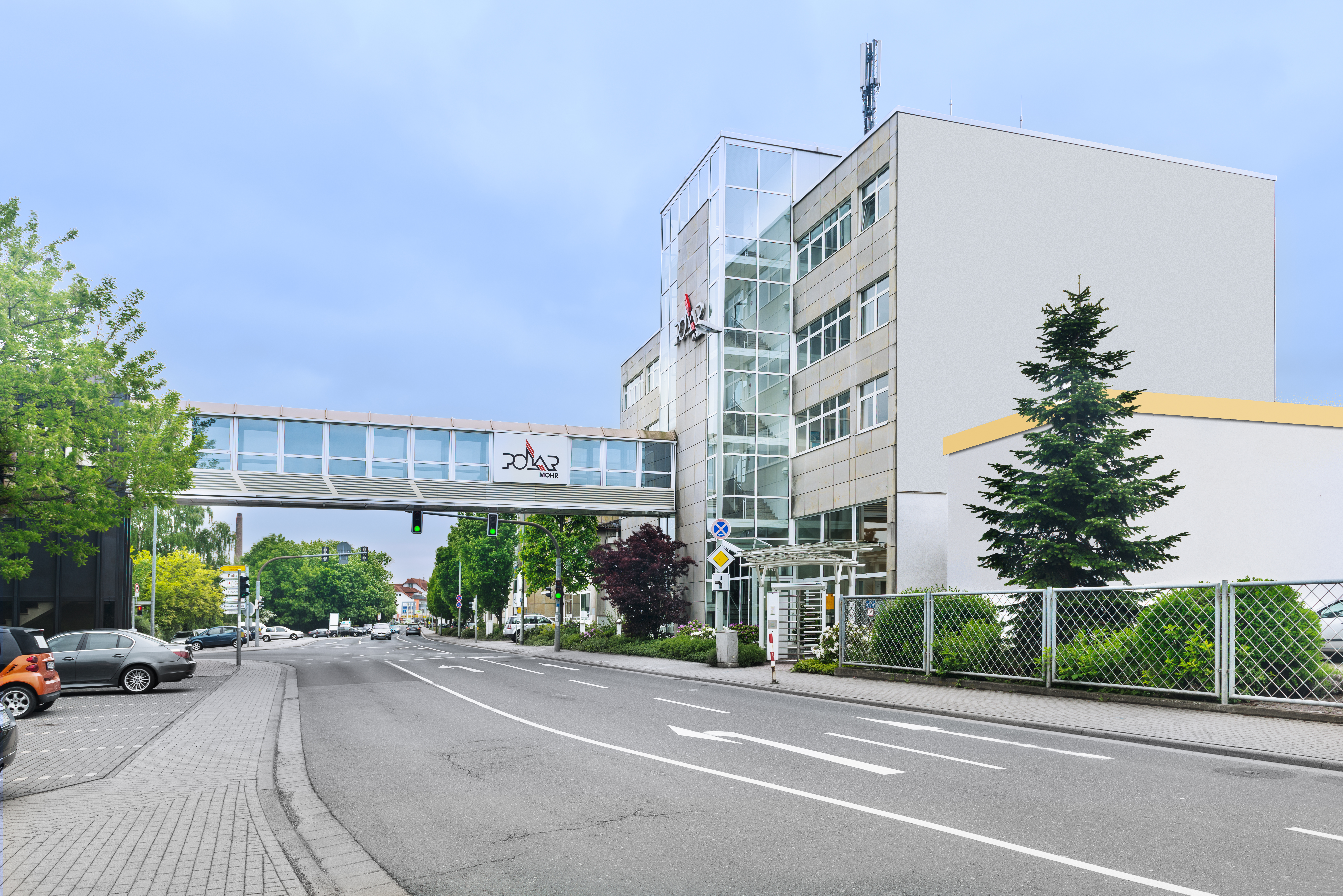 POLAR-Mohr Gebäude